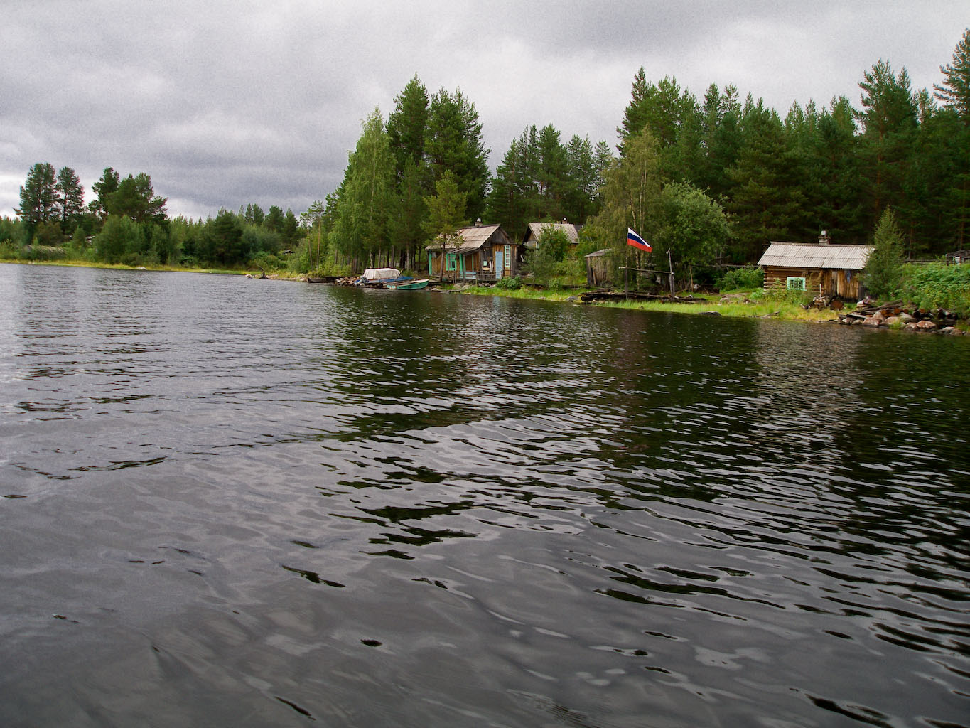 р. Лопская, вид на Лопскую Запань